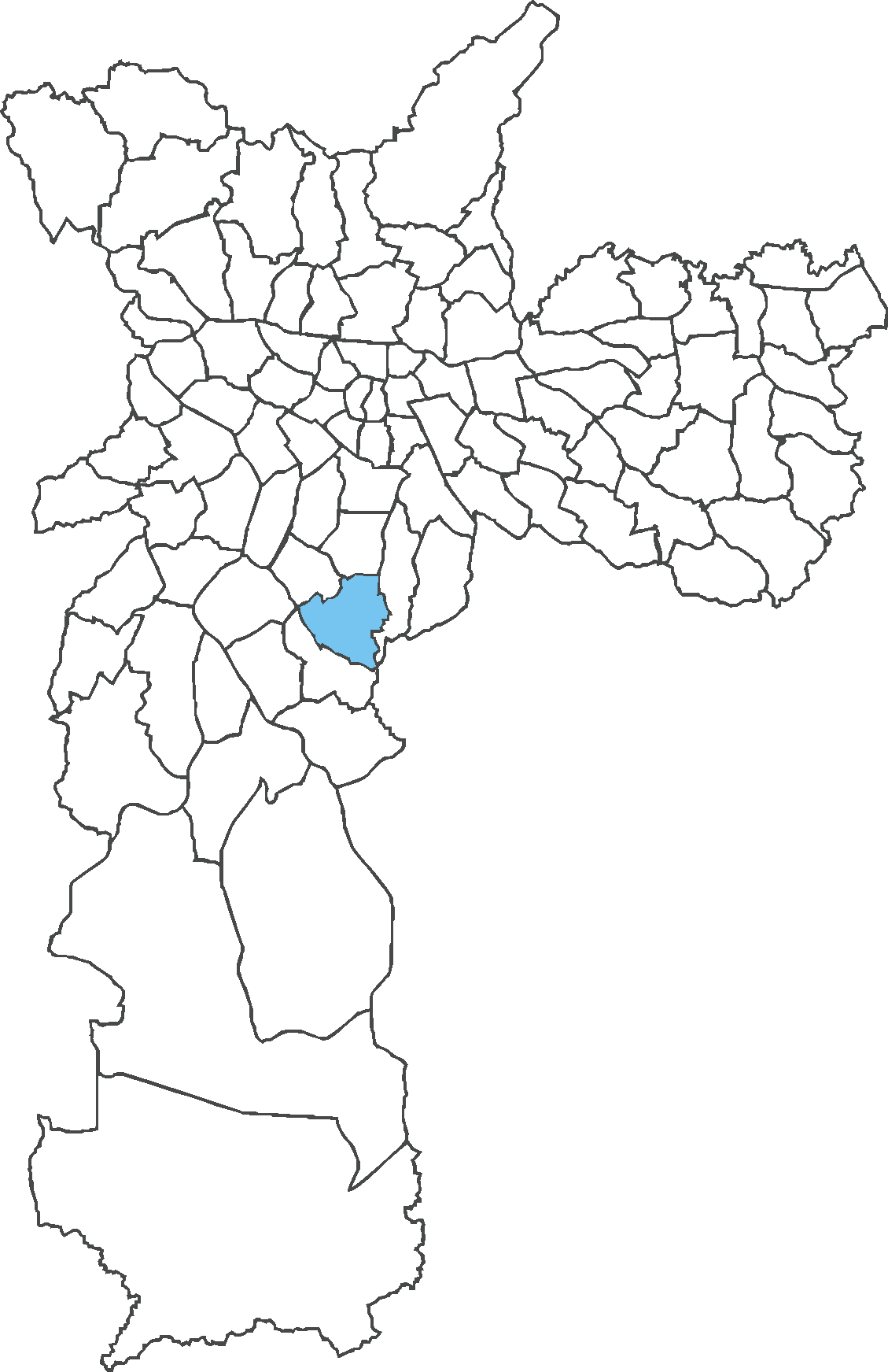 Localização do distrito de Jabaquara no município de São Paulo.